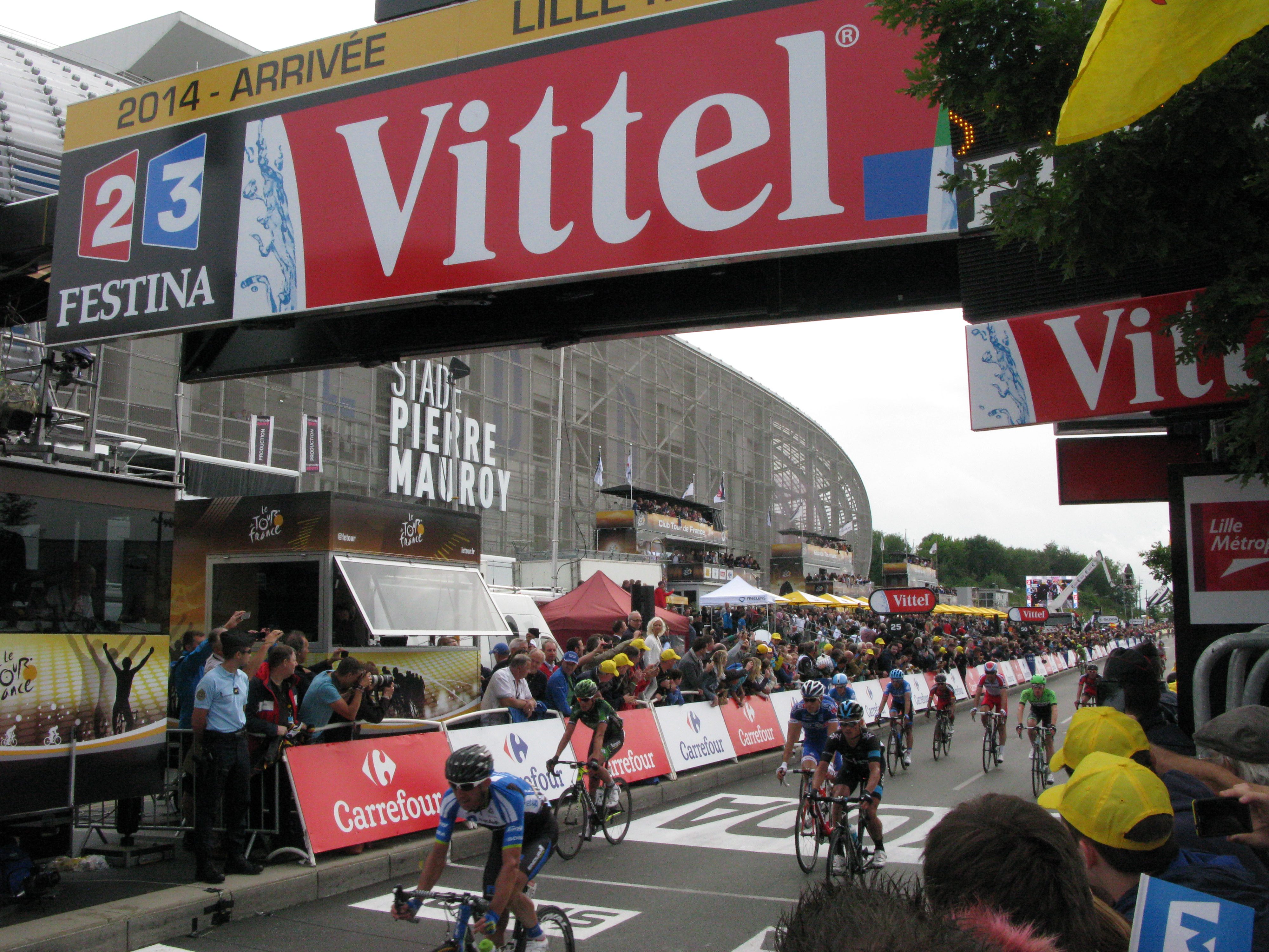 Bartosz Huzarski, Vasili Kiryenka, Alexandre Pichot, Arnold Jeannesson, Jérémy Roy. Arrivée de la 4e étape du Tour de France 2014 à Villeneuve-d'Ascq.